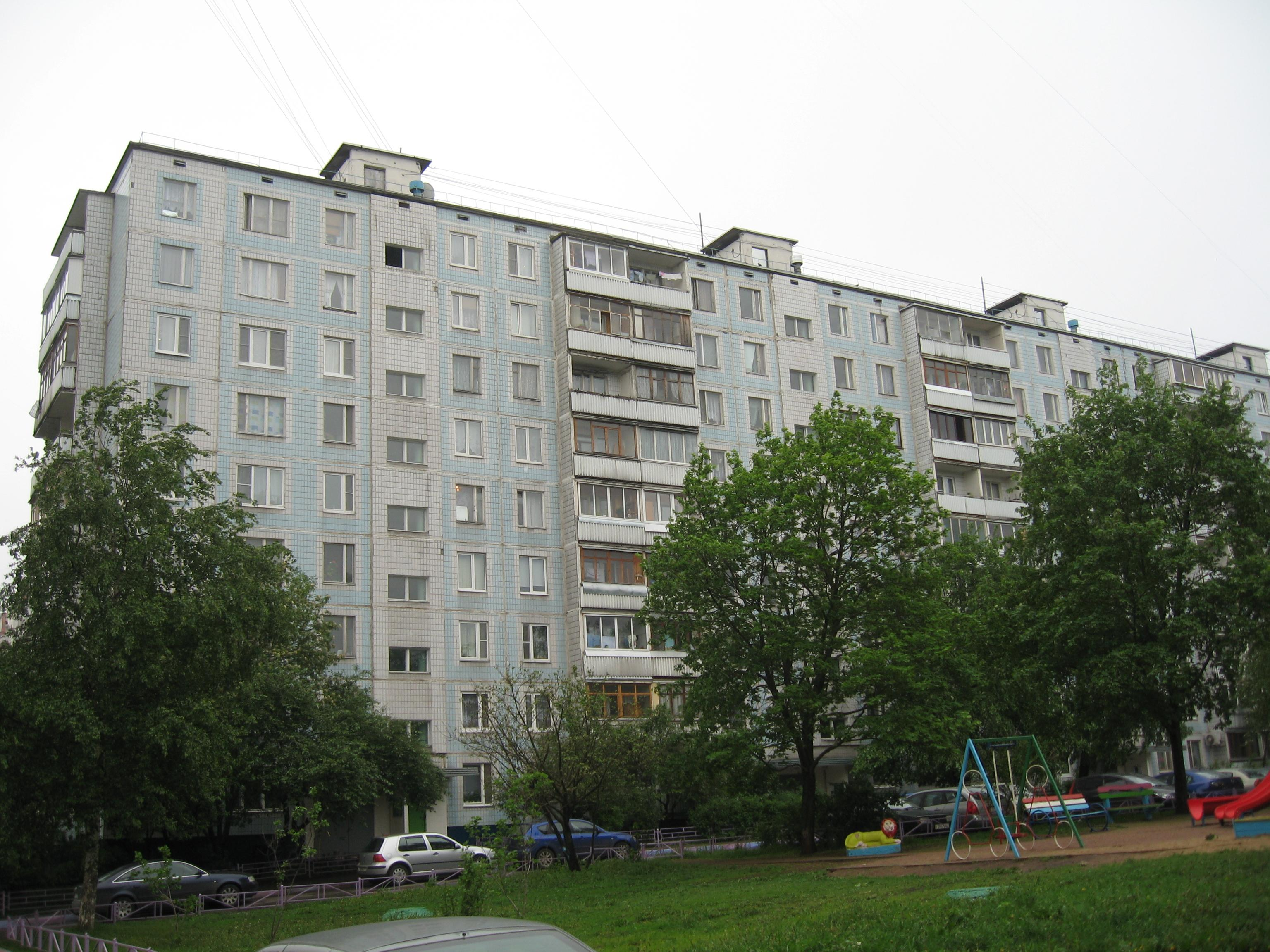 Фасад здания серии II-49